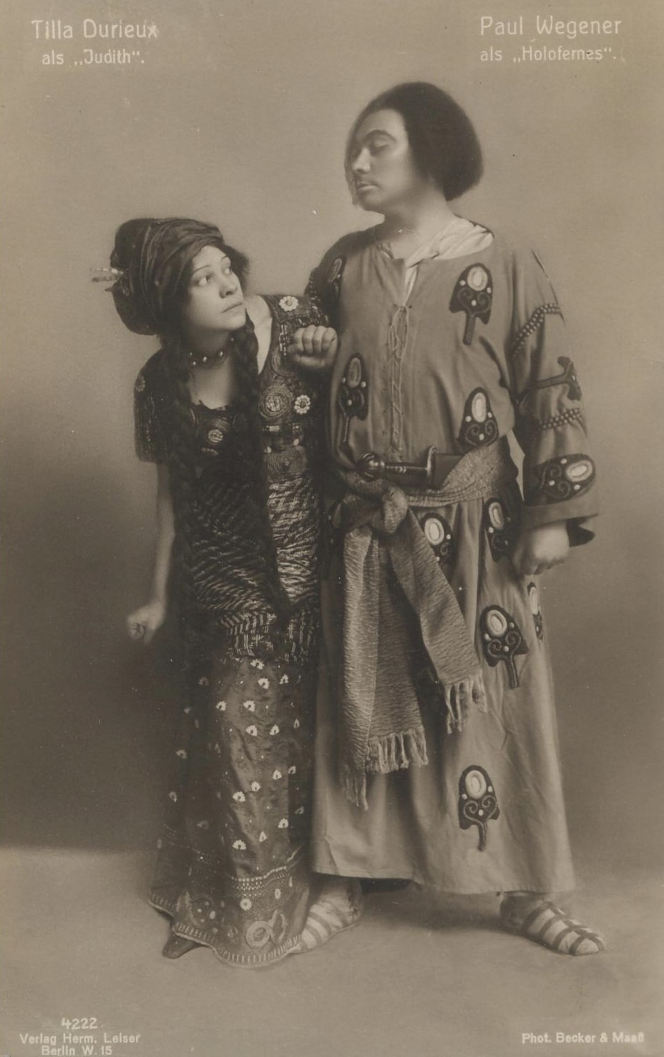 Tilla Durieux und Paul Wegener als Judith und Holofernes. Photopostkarte des Ateliers (Otto) Becker & (Heinrich) Maass, um 1915